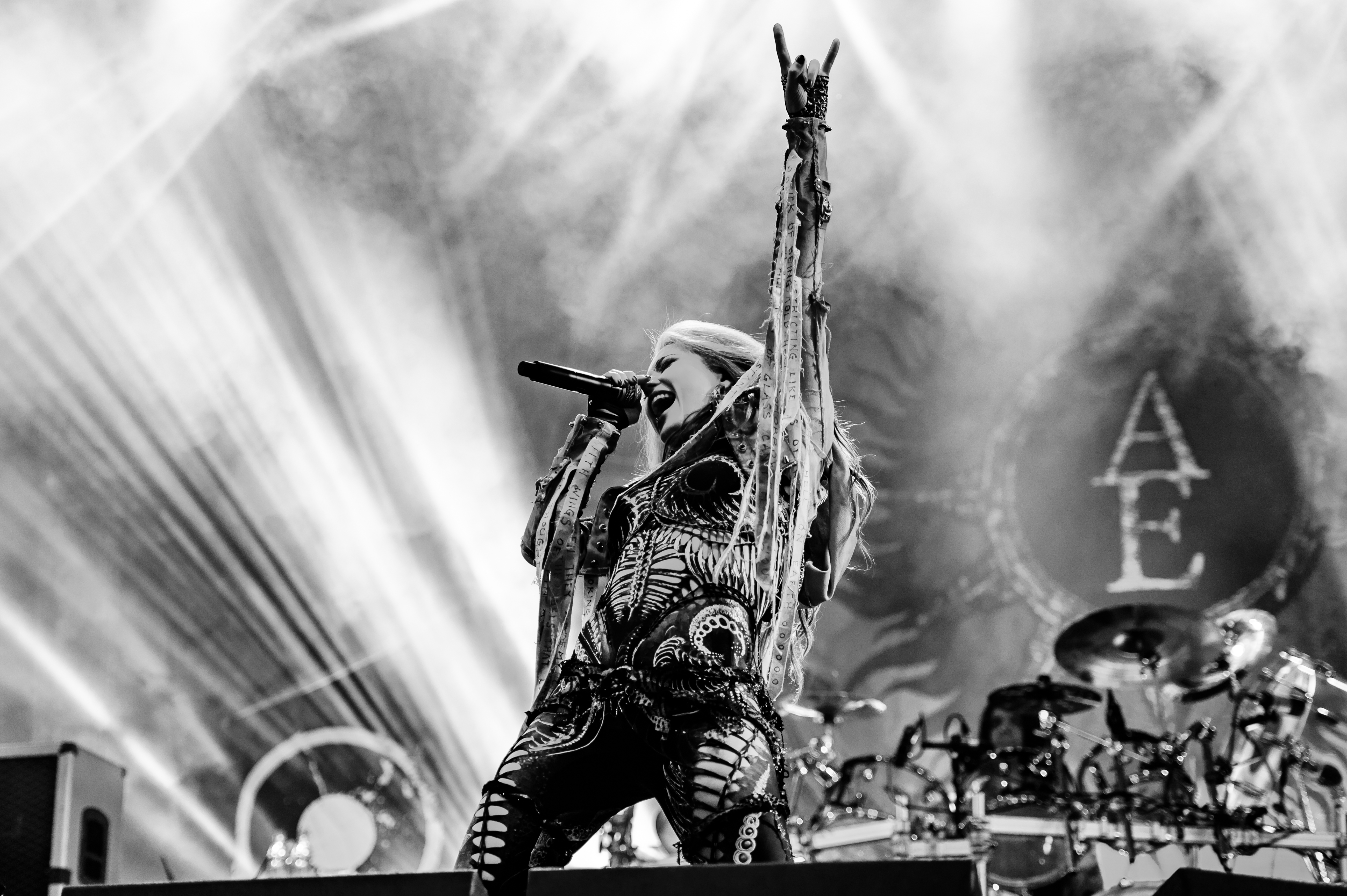 'RockHarz Open Air 2017; Ballenstedt': 'Arch Enemy'